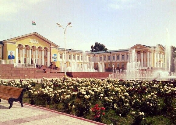 Дворец культуры "Арбоб" в Гафуровском районе (Таджикистан) Тоҷикӣ: Кохи "Арбоб" дар ноҳияи Ғафуров